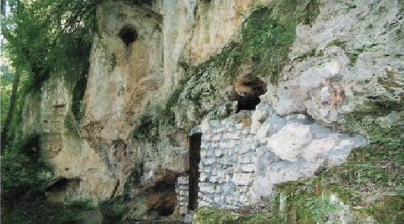 Bogumilska ćelija u selu Paljevo u Raškoj.